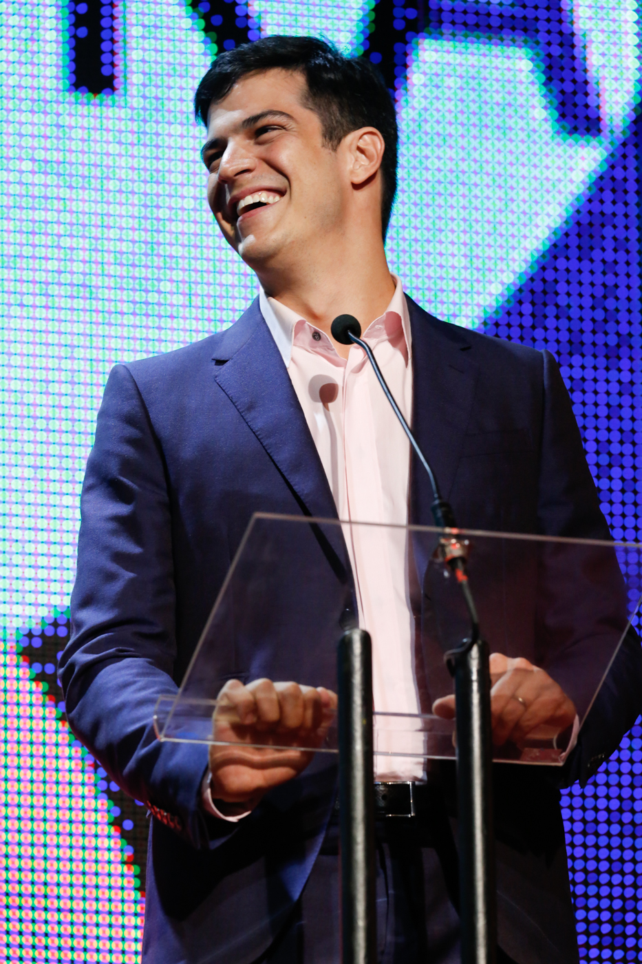 Matheus Solano durante o 25o Premio da Musica Brasileira no Theatro Municipal. Foto: Roberto Filho (14/05/14)